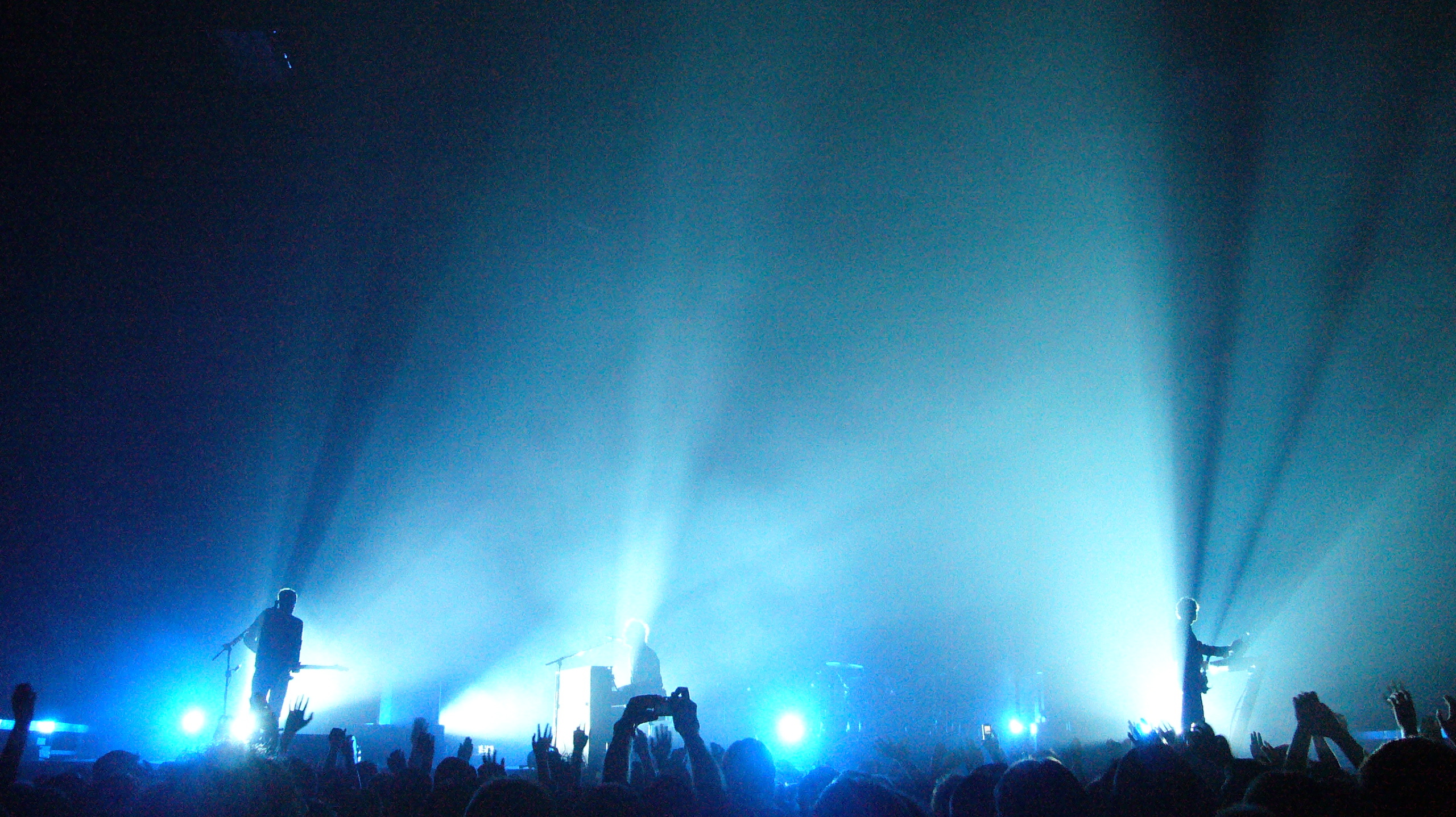 Coldplay-Konzert Hallenstadion Zürich 2005